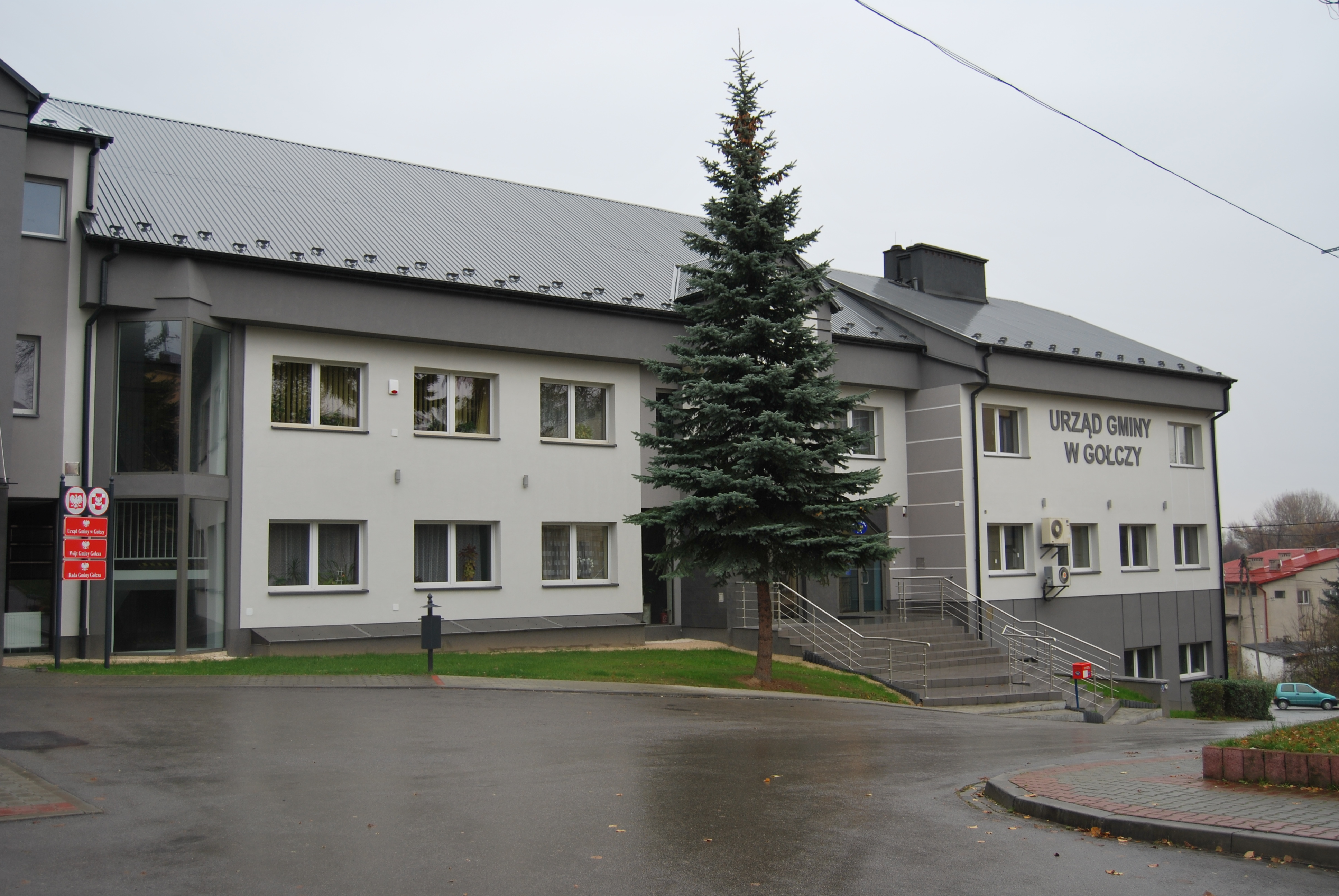 Urząd Gminy w Gołczy (2012).